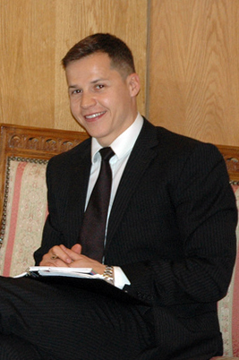 Boris Boillon, Ambassadeur de France à Tunis